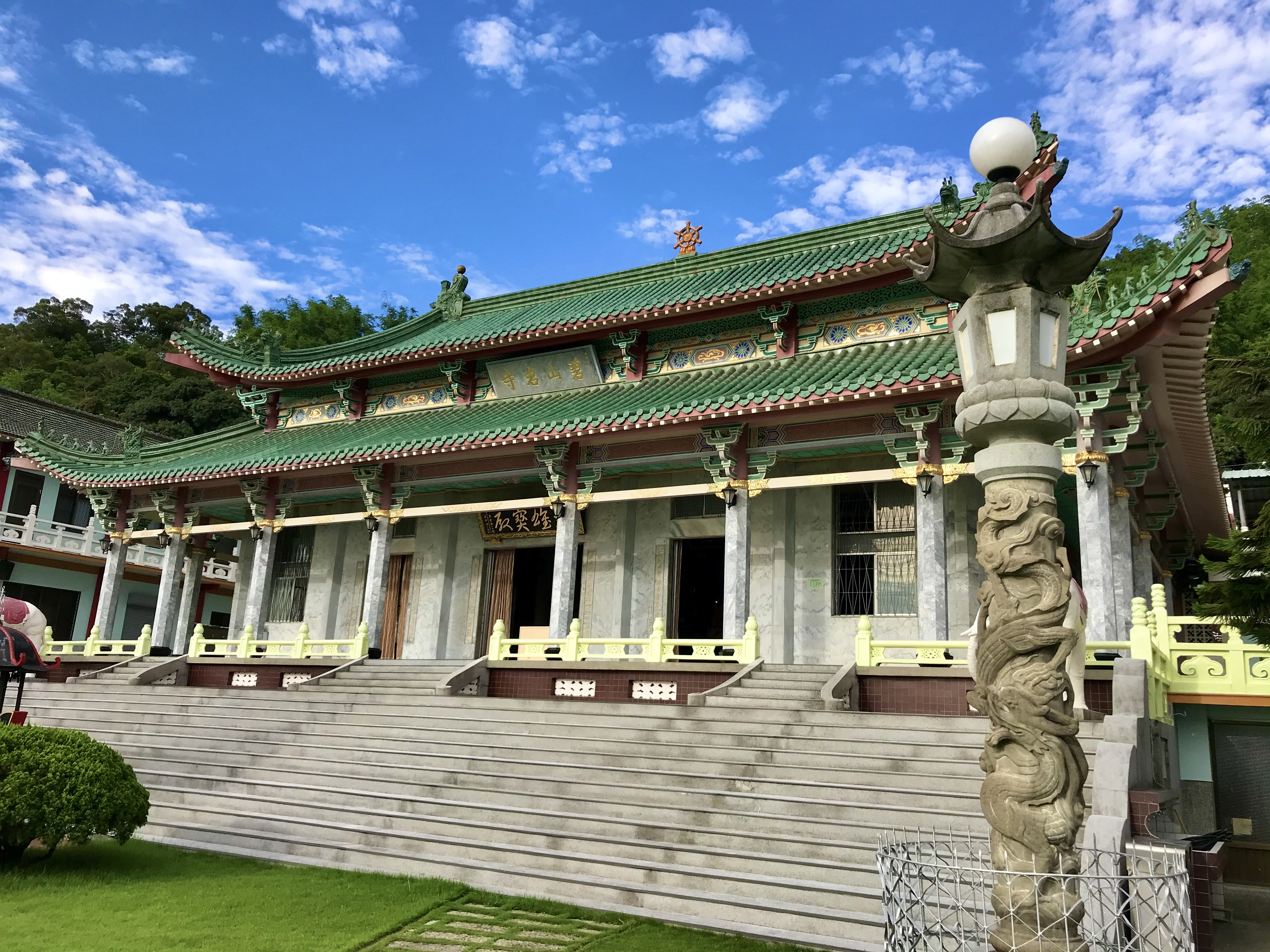 中文（台灣）: 南投碧山巖斜照